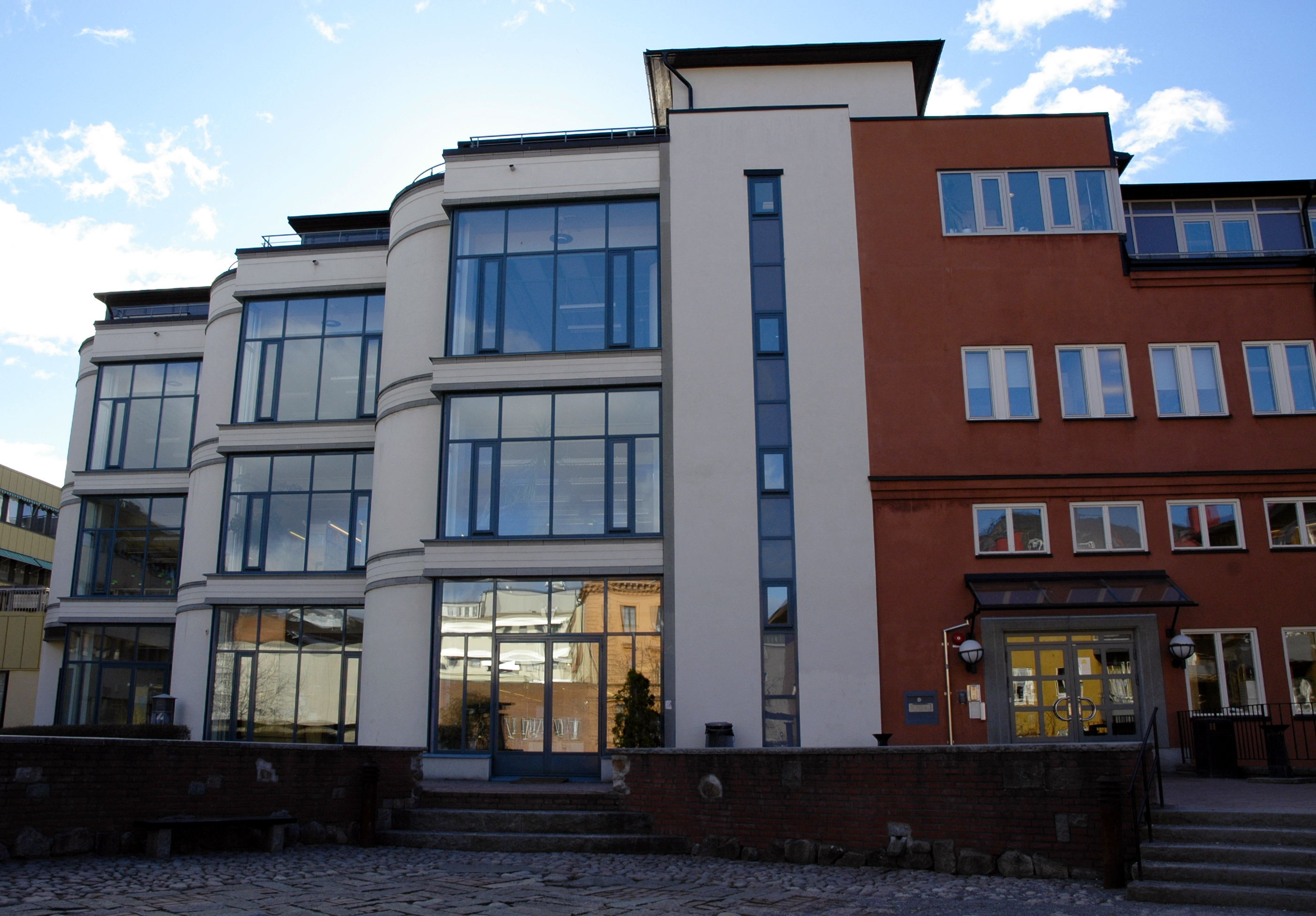 Photo of Dag Hammarskjold library, Uppsala